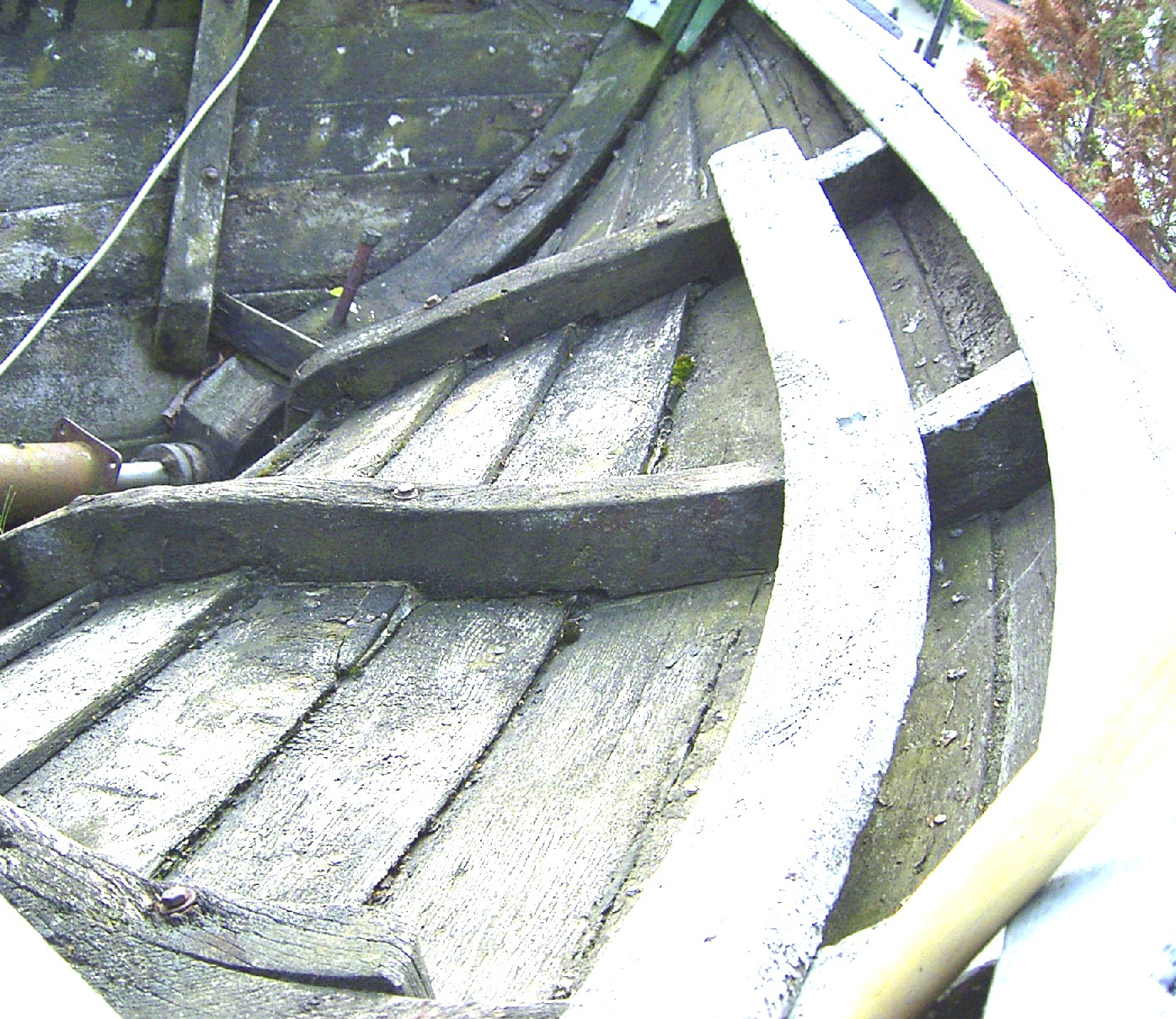 Innenkonstruktion eines alten Ostseefischerbootes in Klinkerbauweise.